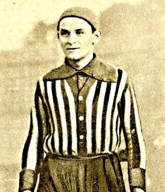 Antonín Kaliba (1898-1936), český fotbalista